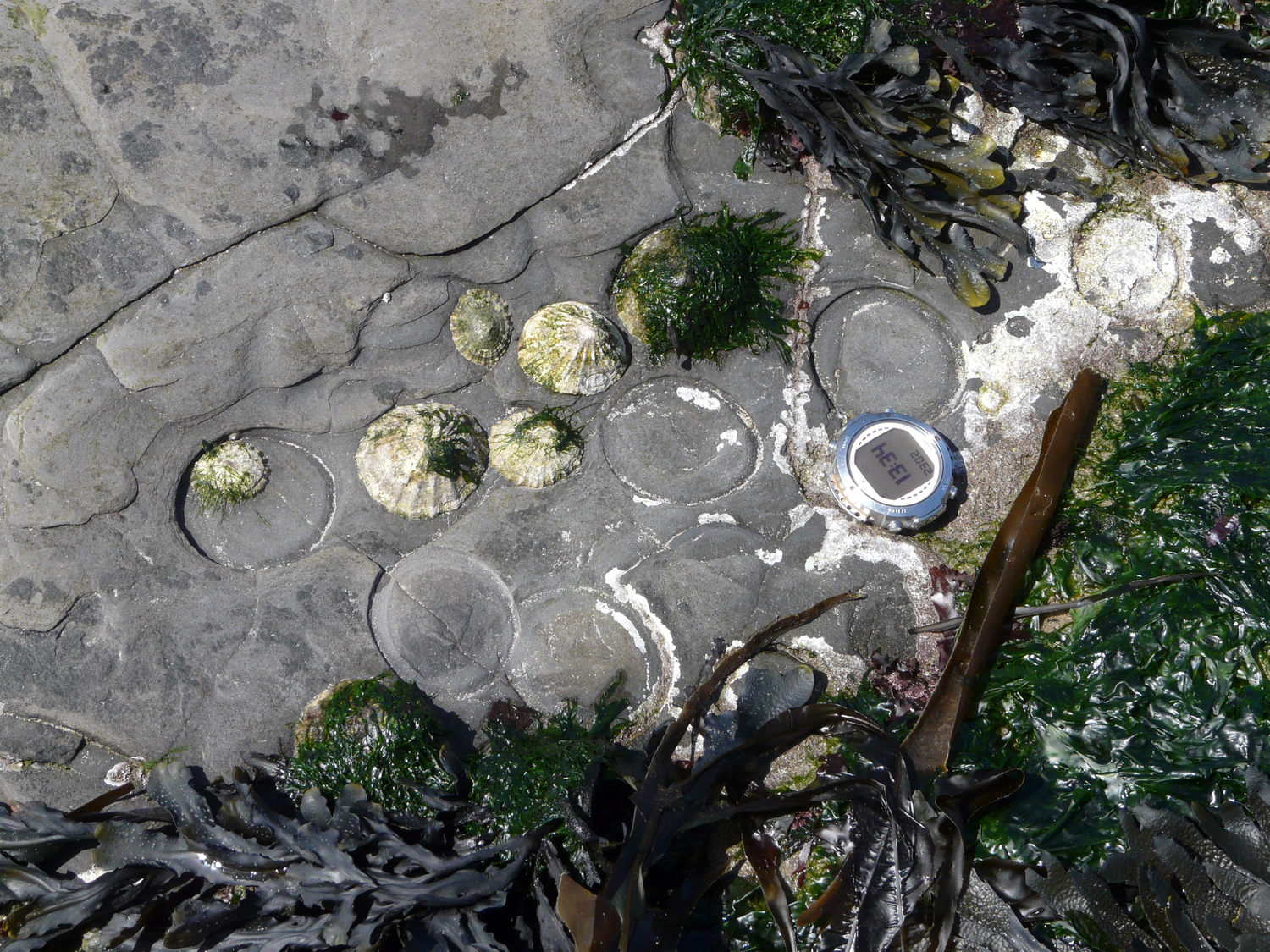 bioerosion d'un rocher basaltique par des patelles